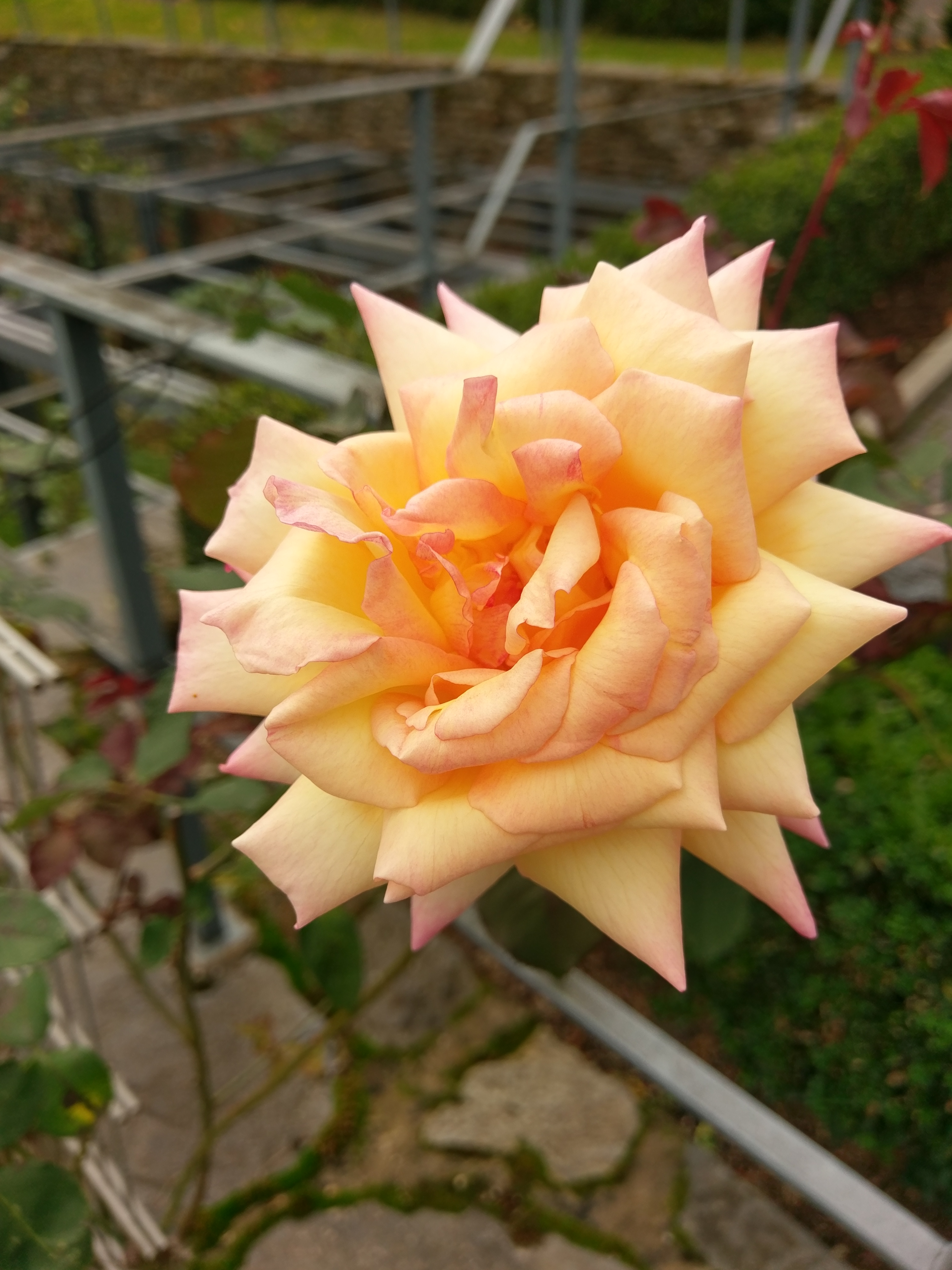 Welterbe-Rose "Zauber der Loreley". Züchter: Klaus Zerwes, 2007. Propstei Hirzenach, Rheinland-Pfalz